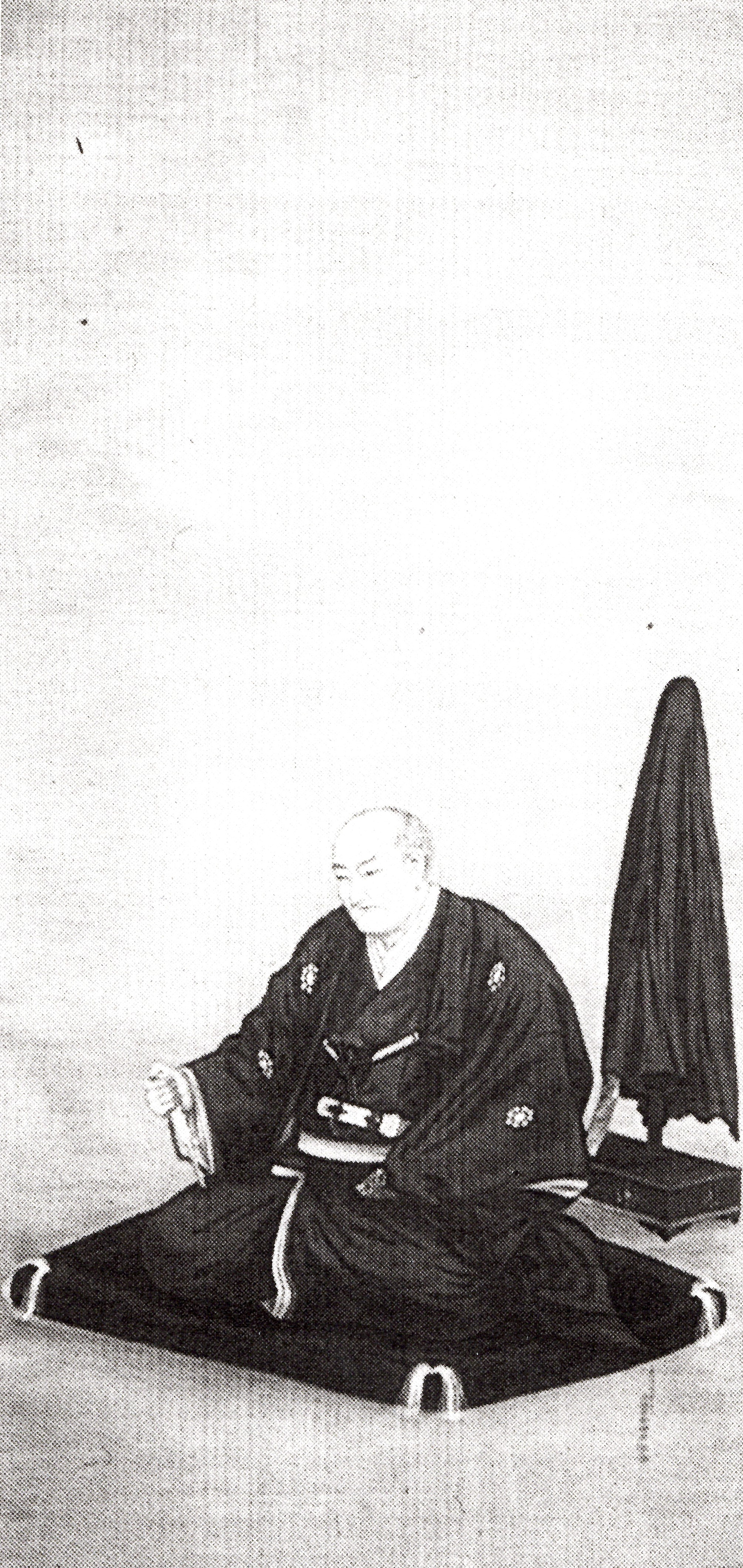 肥後宇土藩9代藩主・細川行芬の肖像画。